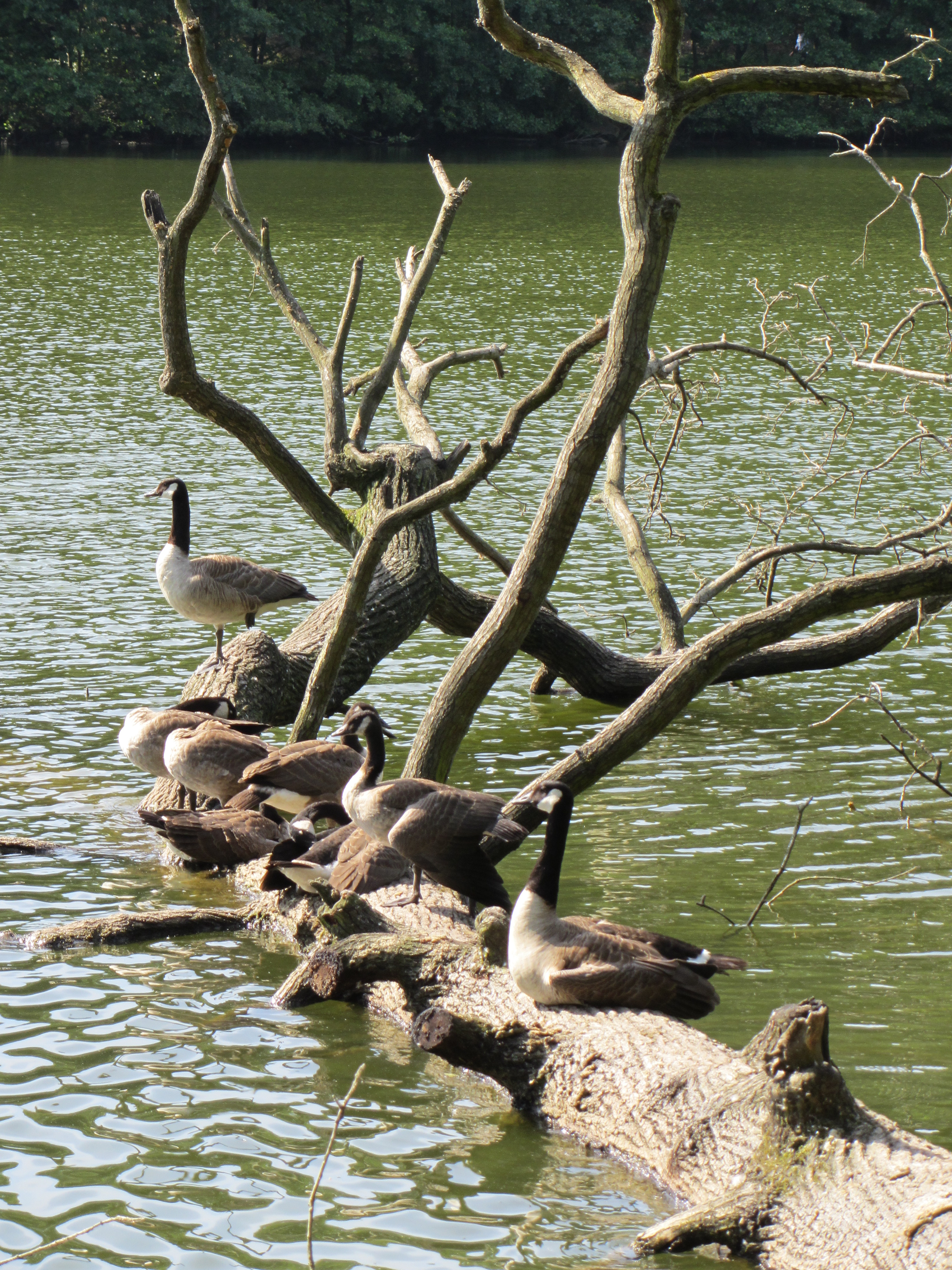 Oies bernaches du Canada sur l'Etang du Moulin à Renard (Guyancourt, Yvelines, France)